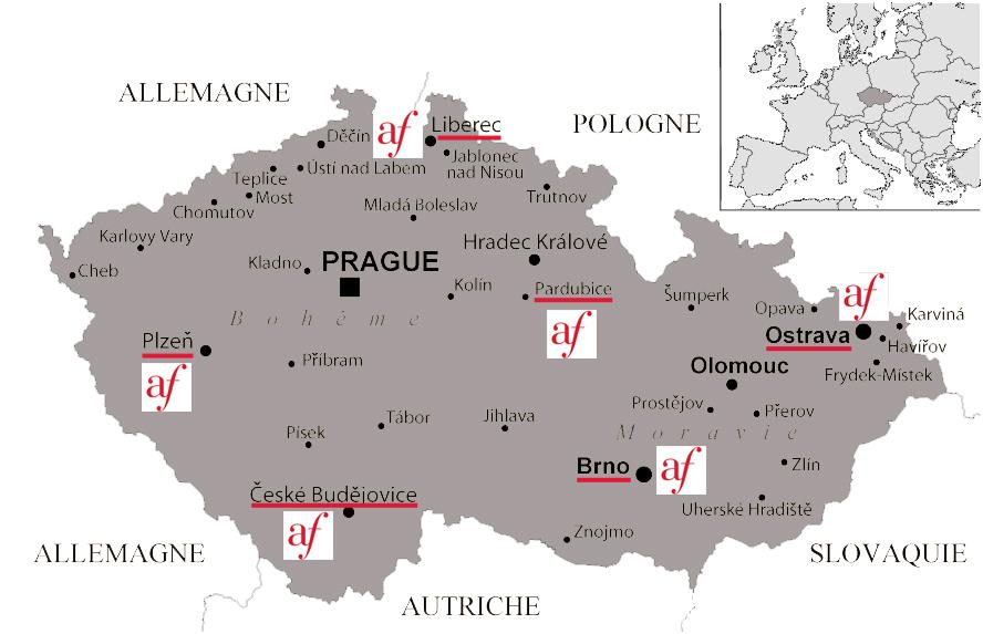 Carte des Alliances françaises en République tchèque